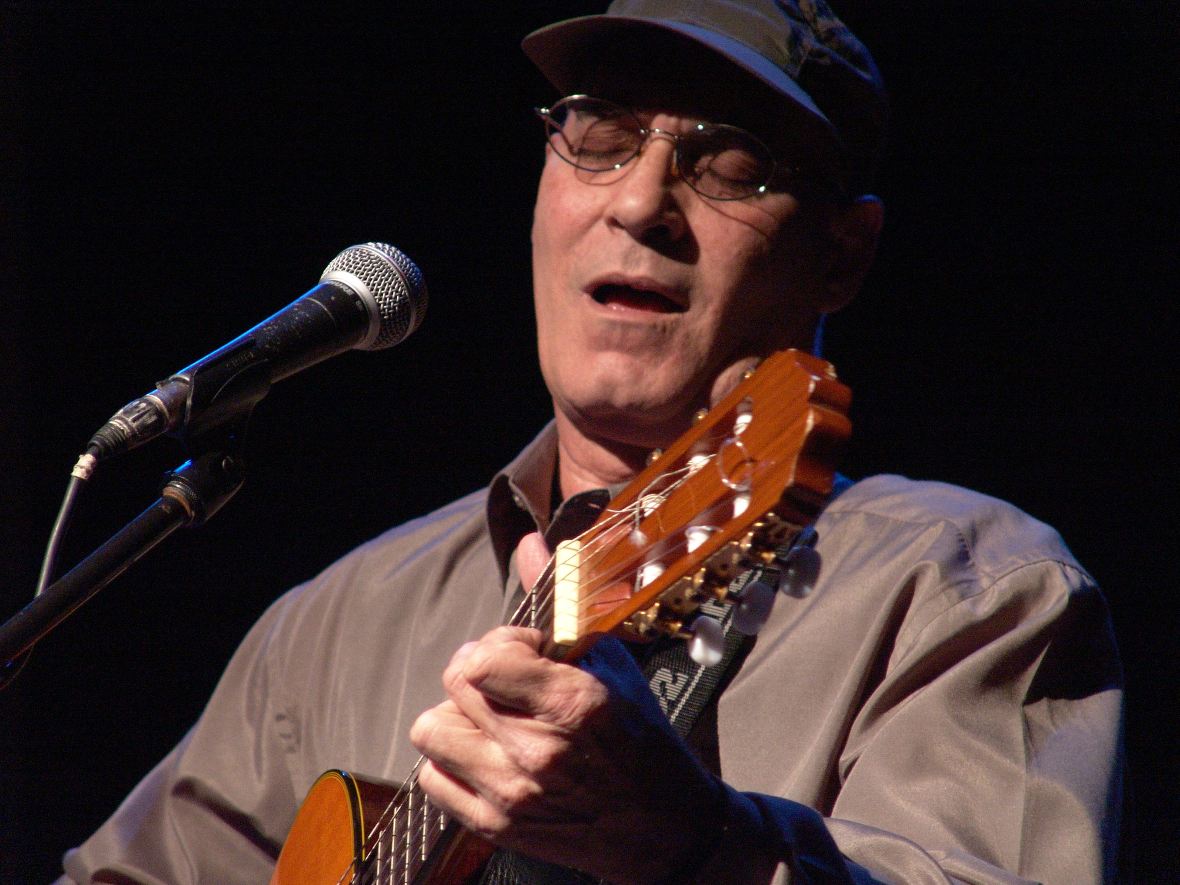 Vicente Feliú Encuentro de la Canción Social de Latinoamérica y el Caribe Buenos Aires, 18 de mayo de 2015